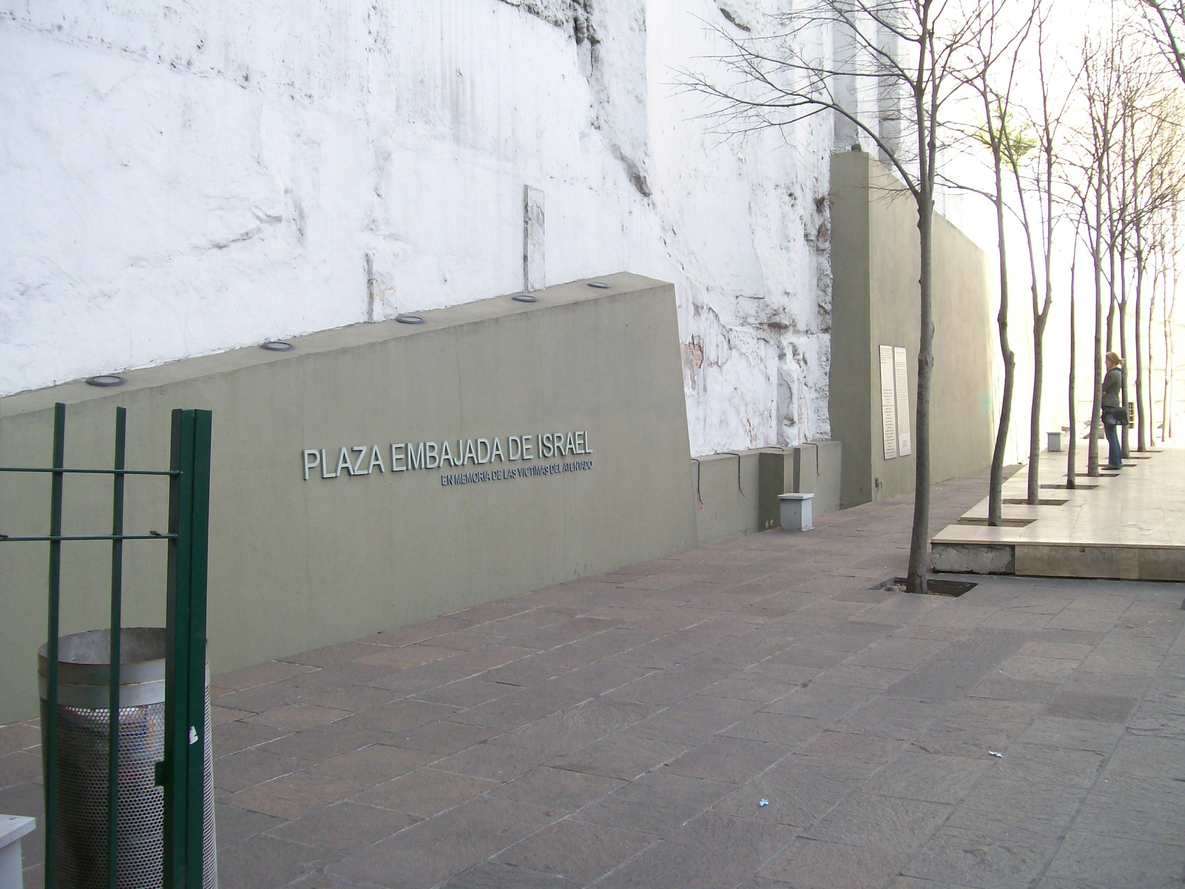 Plaza Embajada de Israel,Buenos Aires